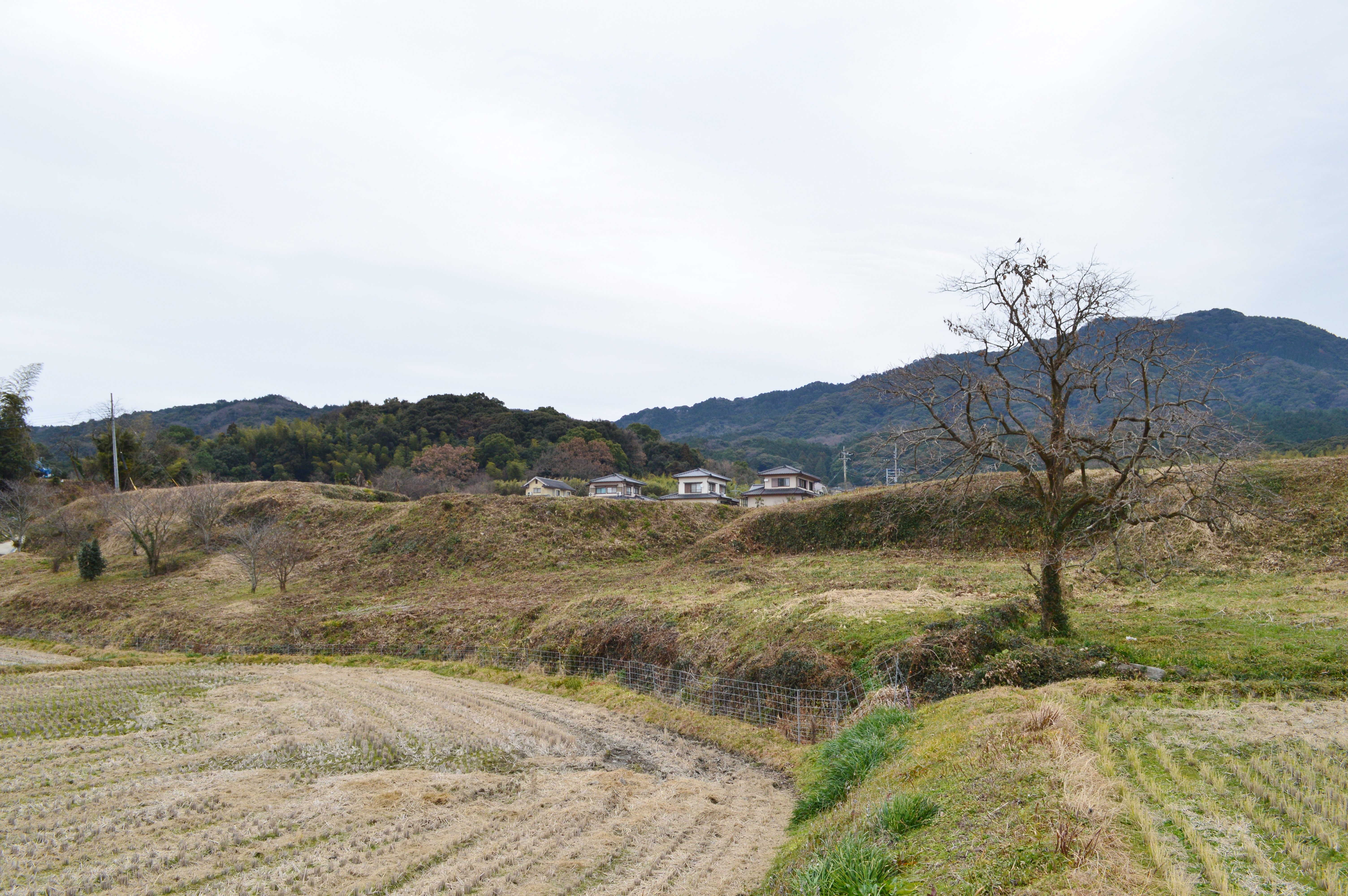 怡土城 大門口付近の土塁